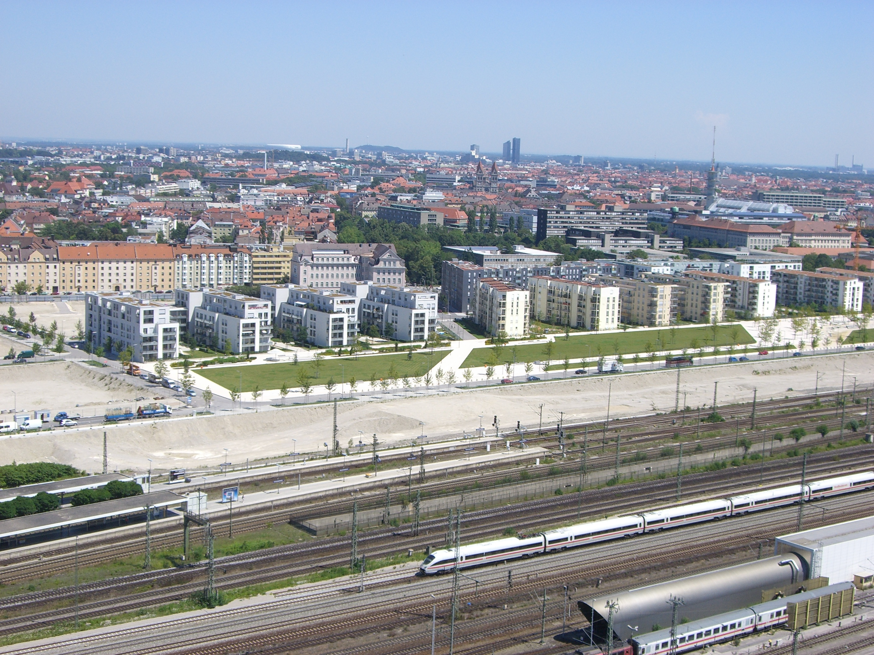 München - Arnulfpark (Panorama)